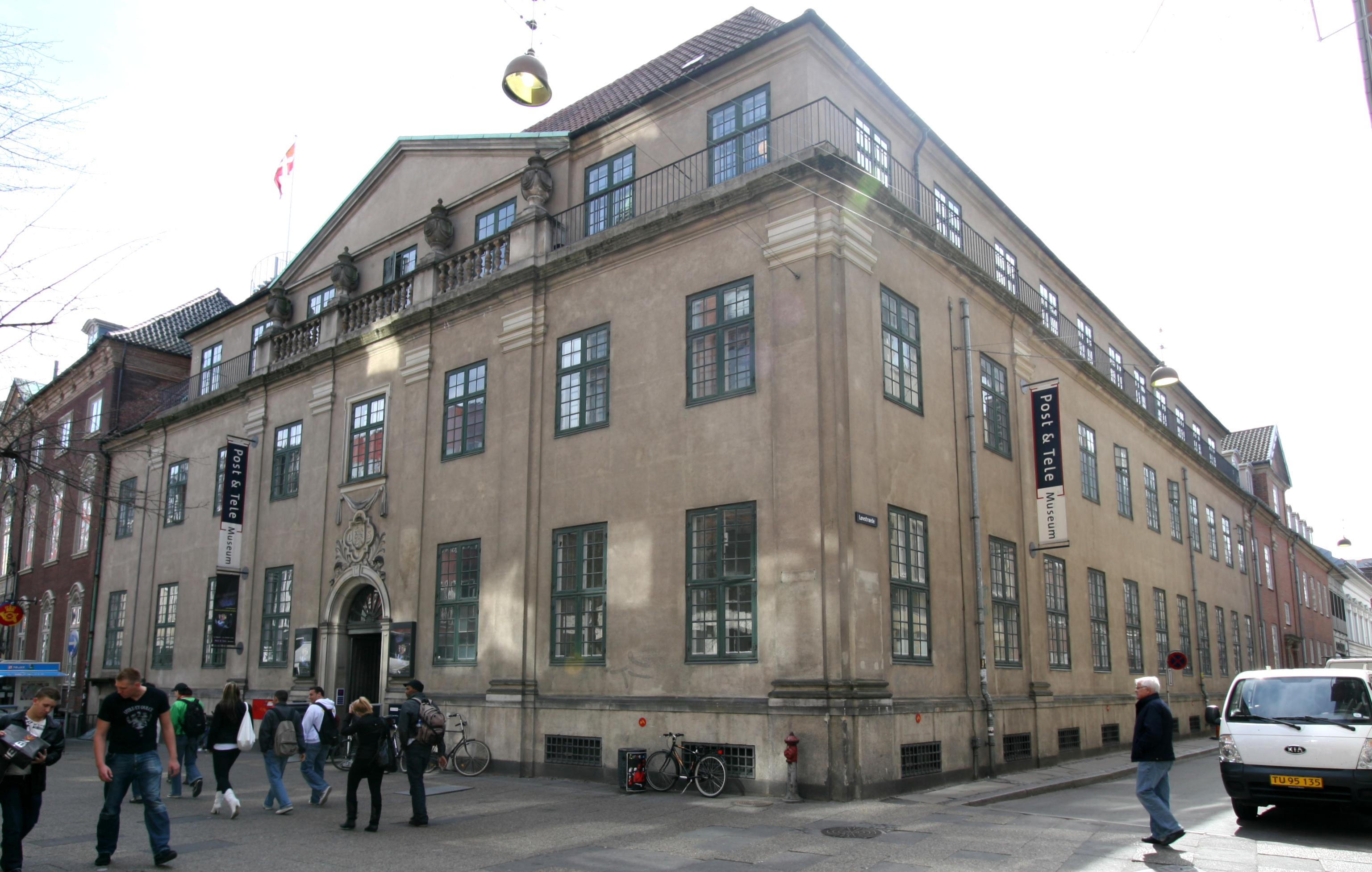 Post & Tele Museet in Copenhagen.